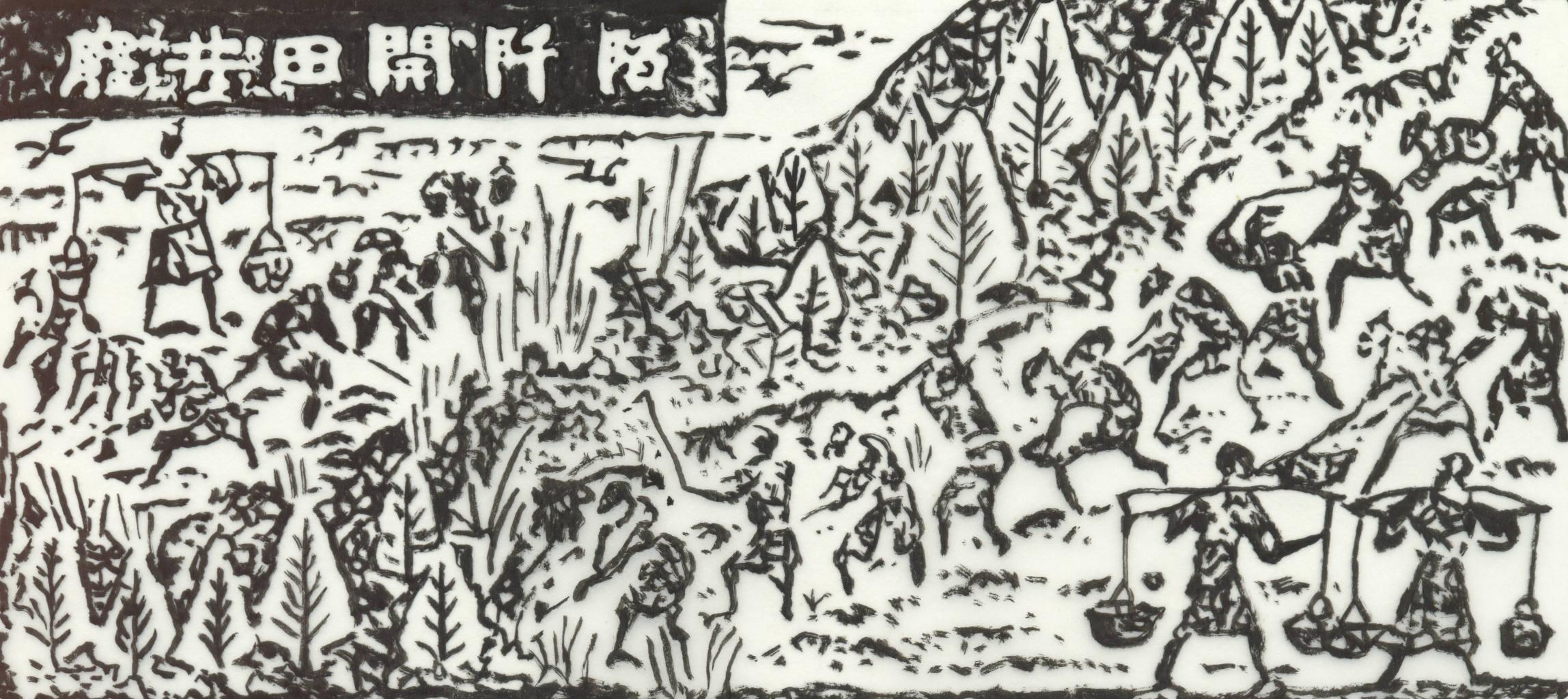 废井田，开阡陌（汉代画像砖）